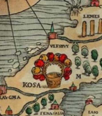 Kousa kuvattuna Carta Marinassa